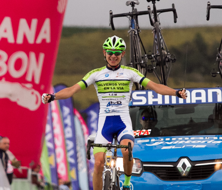 Miguel Ángel Reyes Etapa 9 Vuelta a Colombia 2017 Jueves 10 de agosto de 2017. 137Kms La Dorada - Alto de Letras.